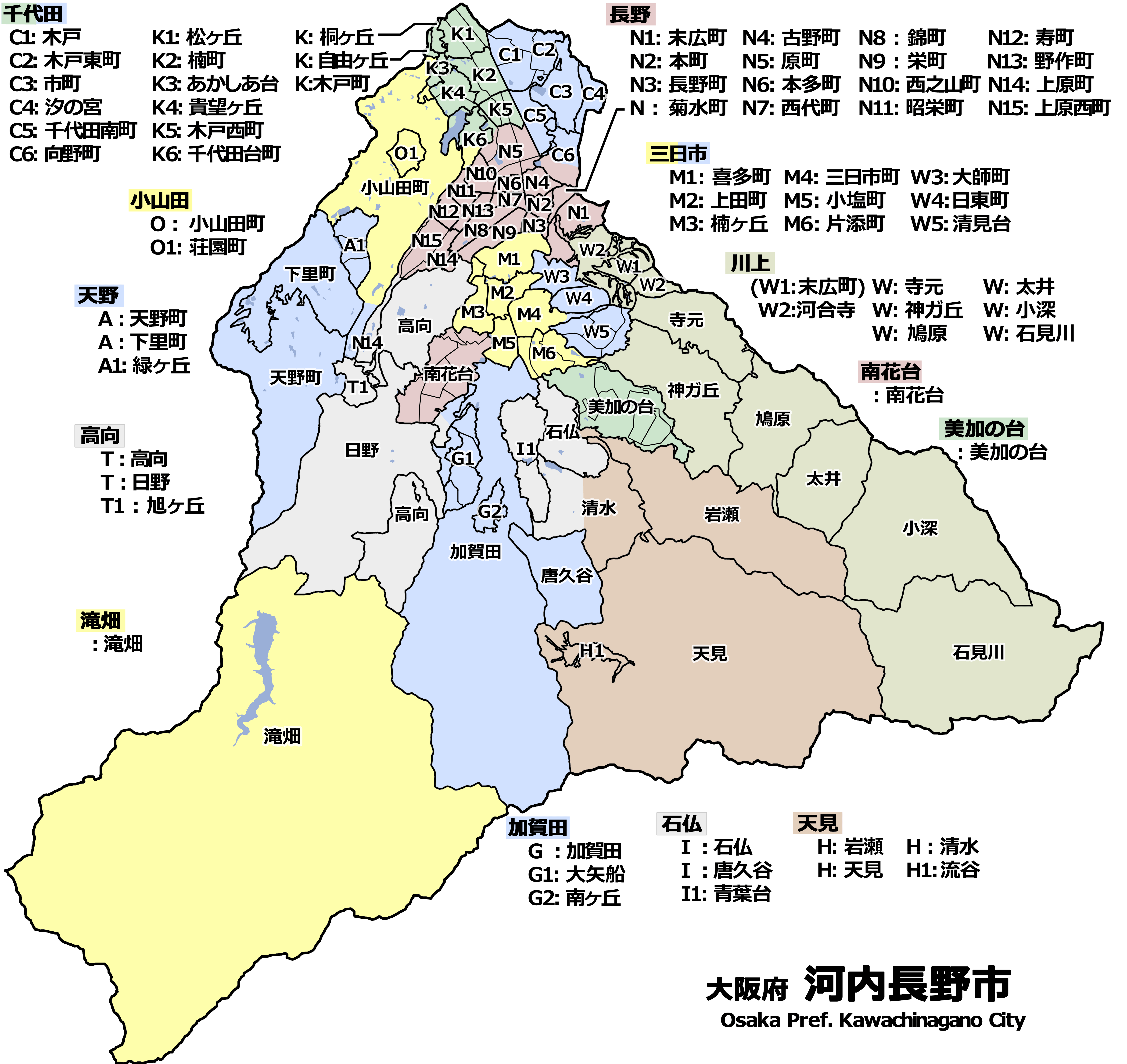 大阪府河内長野市の地域別色分け地図 （小学校区をベースに地域分けしたもの。ただし三日市地域は特性に合わせて川上地区の一部を含めている）